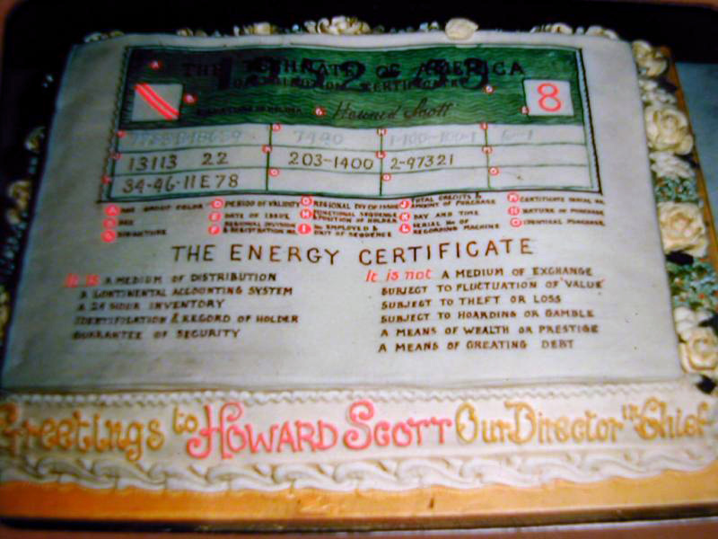 Gâteau d'anniversaire représentant un "certificat d'énergie" imaginé par le mouvement technocratique